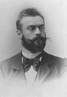 Cornelis Dopper omstreeks 1900